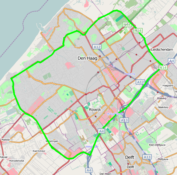 ring Den Haag